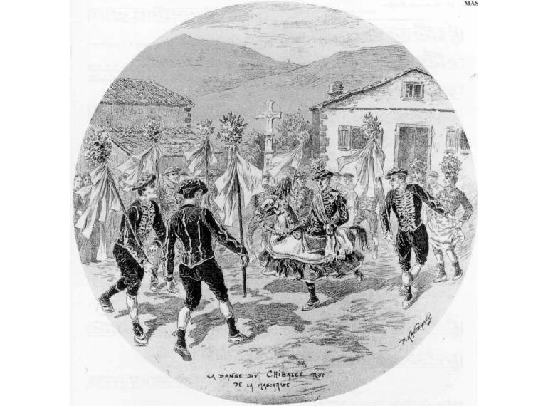 La Danse du Chibalet roi de la MascaradeEuskara: Xiberoko maskaradak, Paul-Adolphe Kauffmann, 1906.